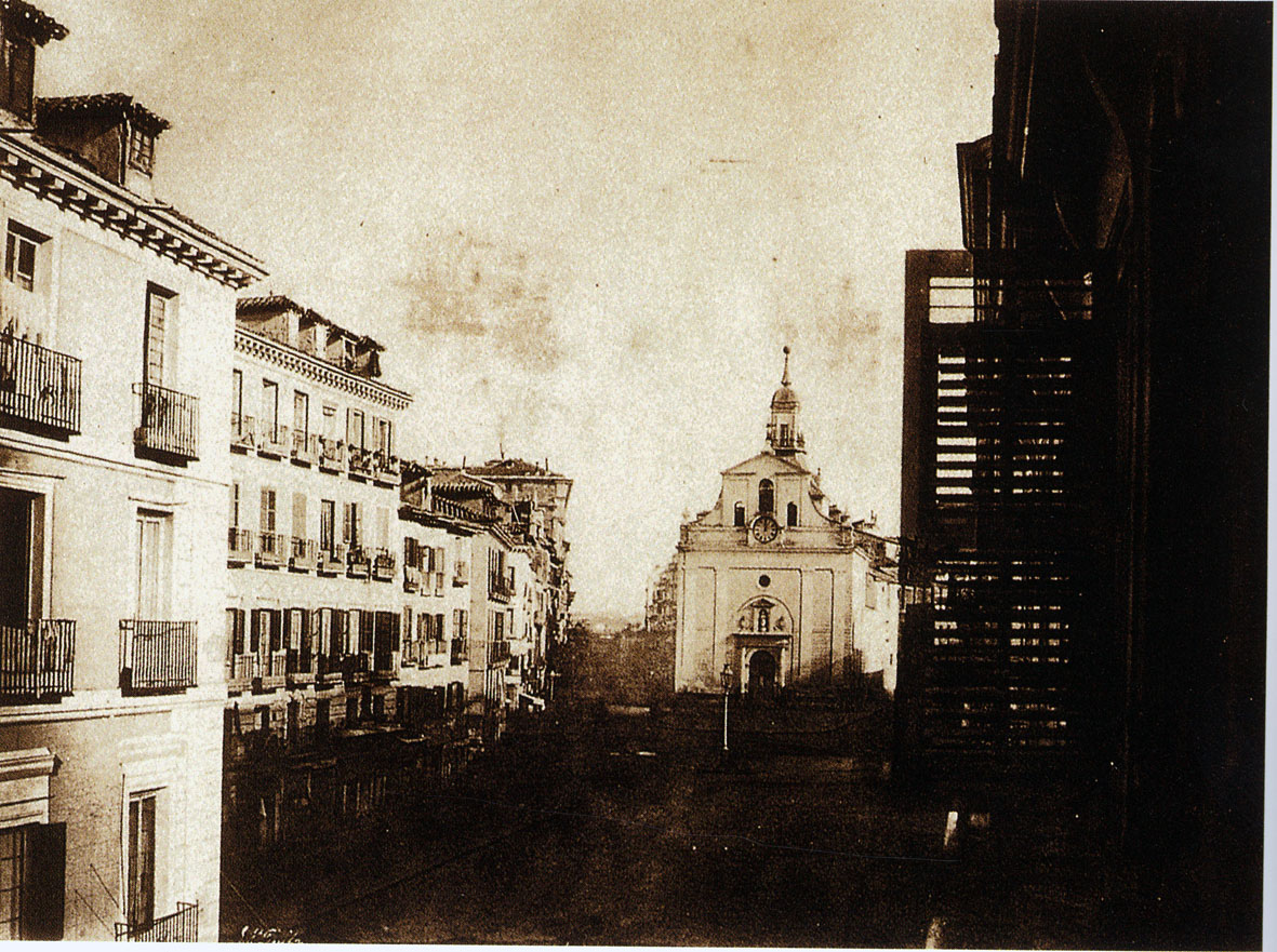 Puerta del sol vista desde la Calle Mayor (año 1854)